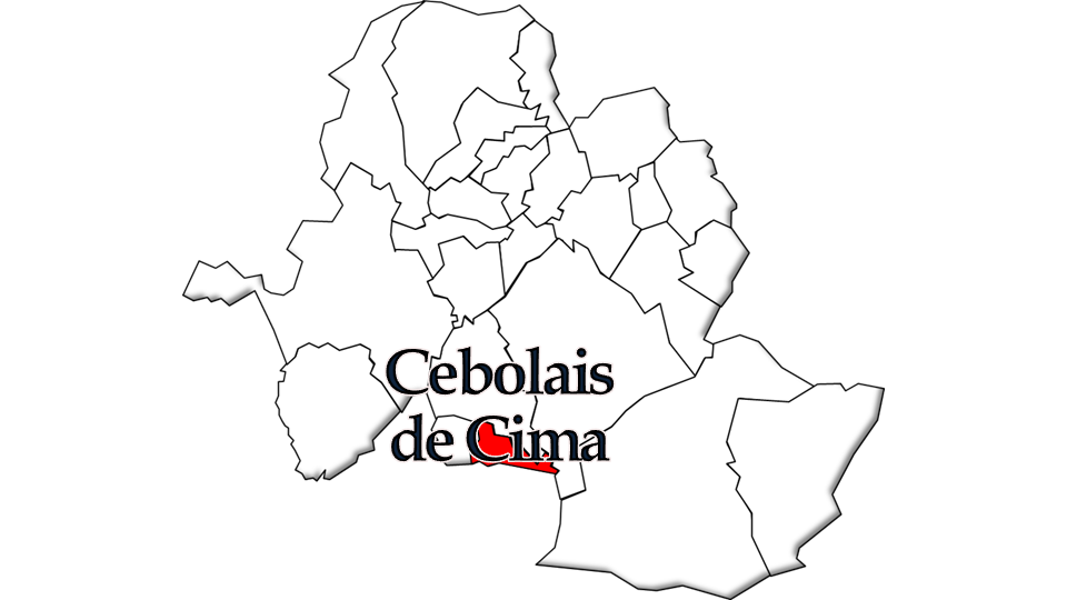 População